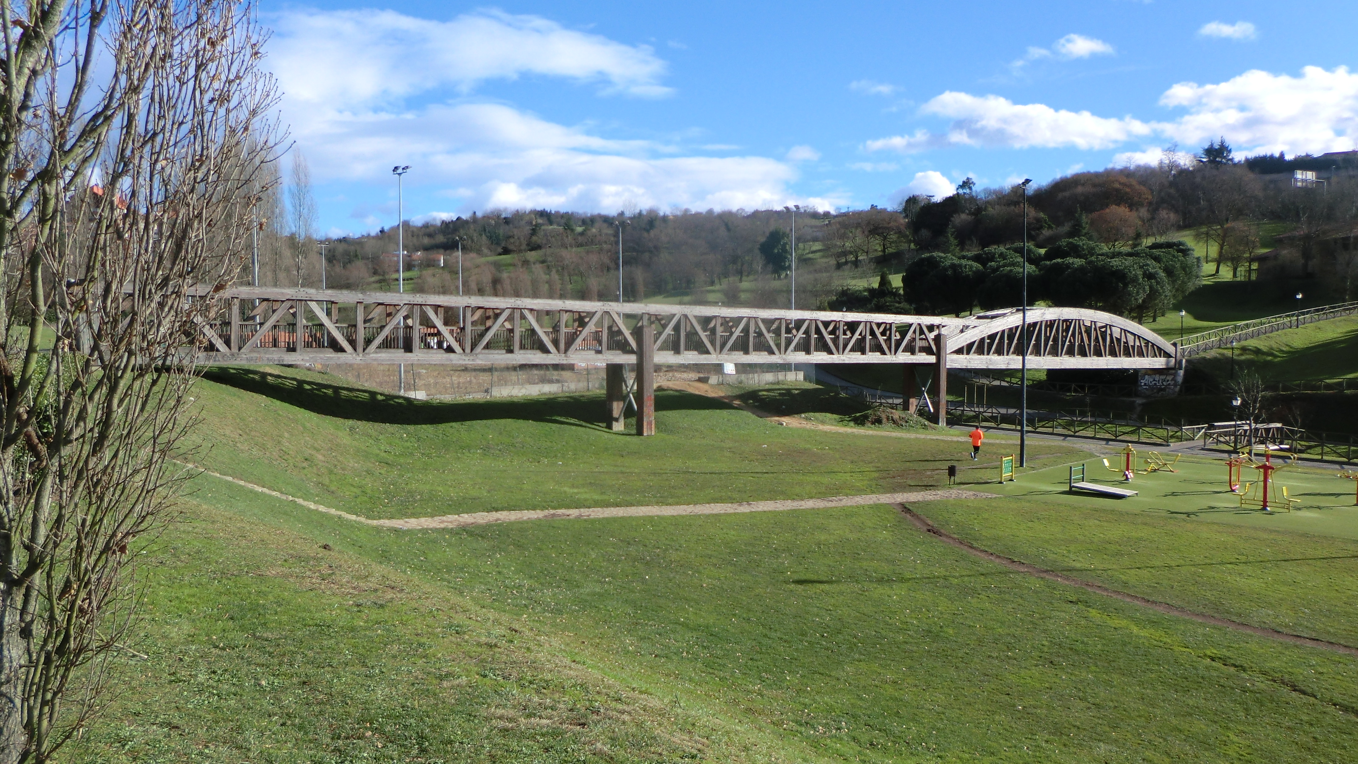 Brücke im Parque de Invierno